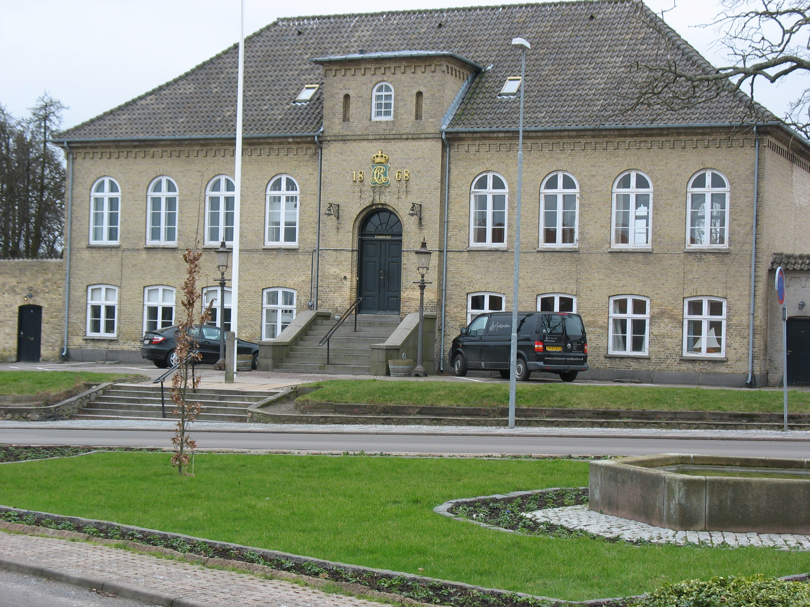 Råd-, ting- og arresthuset på Holtets Plads 1 i Nykøbing Sjælland